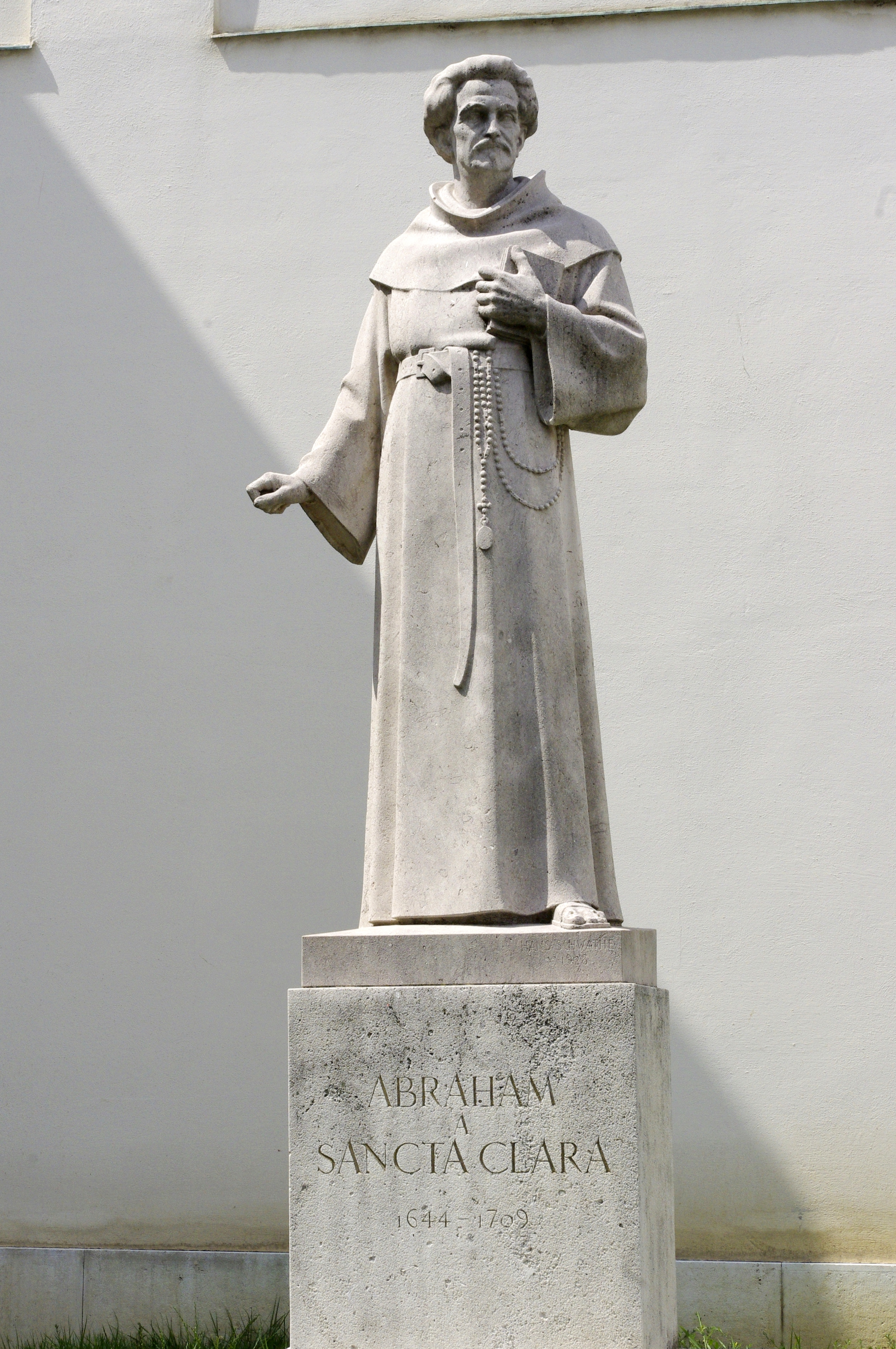 Wien - Abraham a Sancta Clara, Statue von Hans Schwathe an einem der Eingänge zum Burggarten.